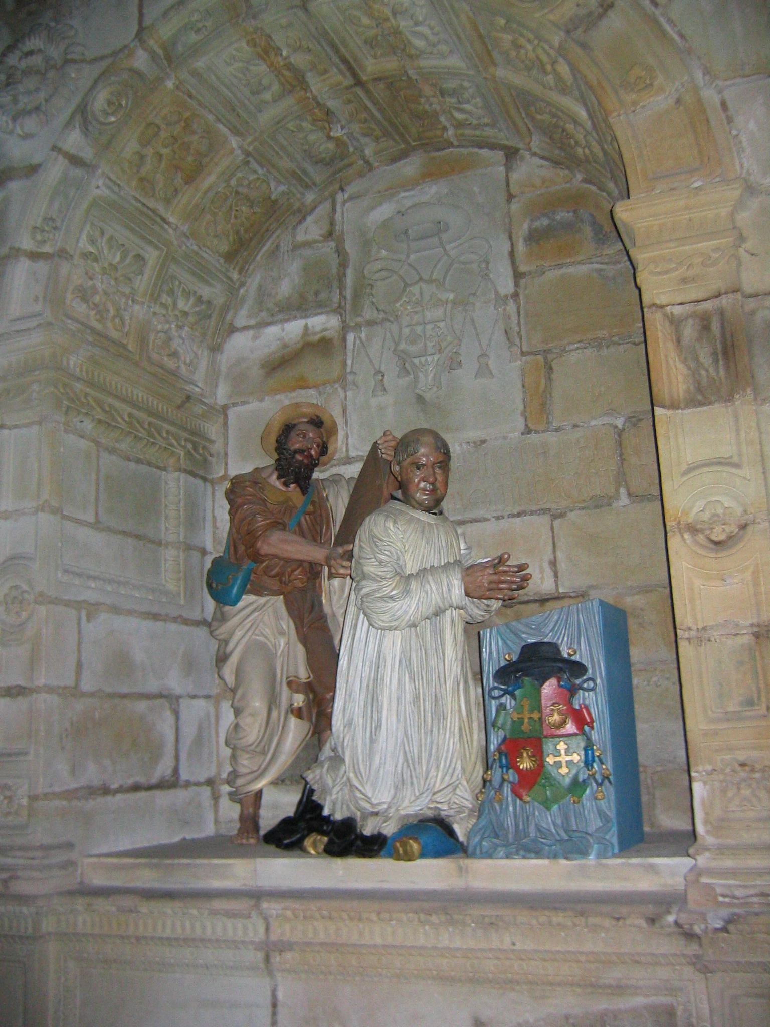 Conjunto escultórico en la Colegiata de Zenarruza Bolívar, Vizcaya, País Vasco, España.